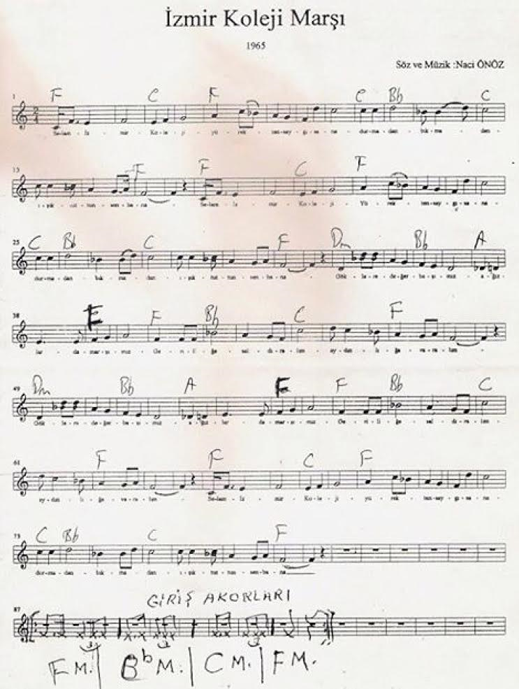 İzmir Koleji (Bornova Anadolu Lisesi) marşı.